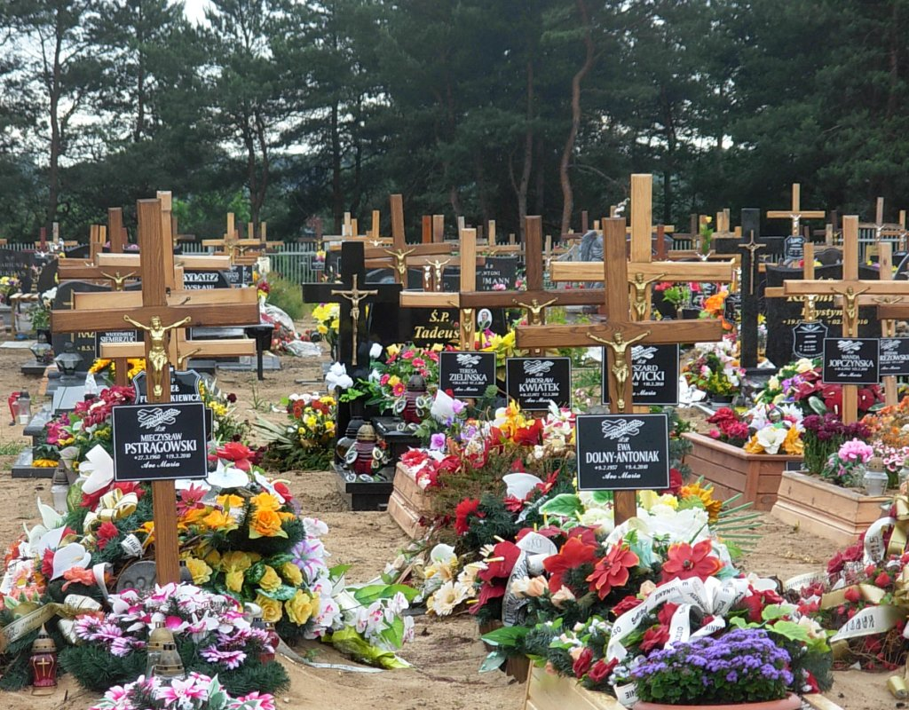 Cmentarz Komunalny, Bydgoszcz - nowe pochówki